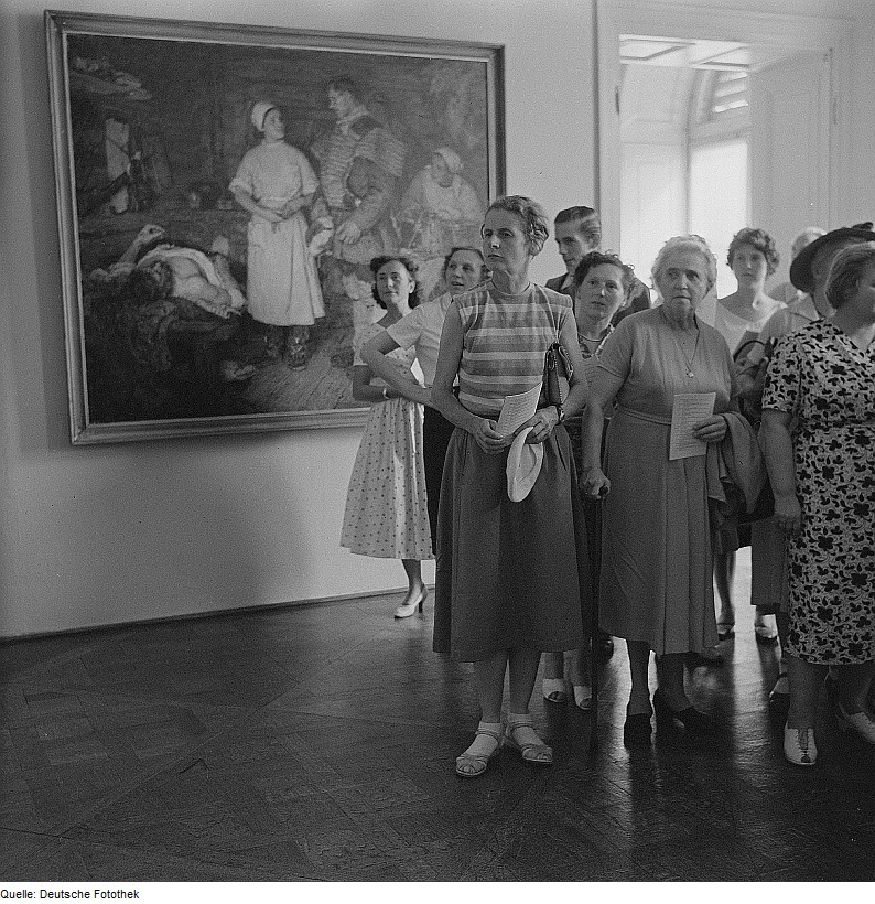 Original image description from the Deutsche FotothekDresden. Schloss Pillnitz, Wasserpalais, Ausstellung von Eva Schulze-Knabe